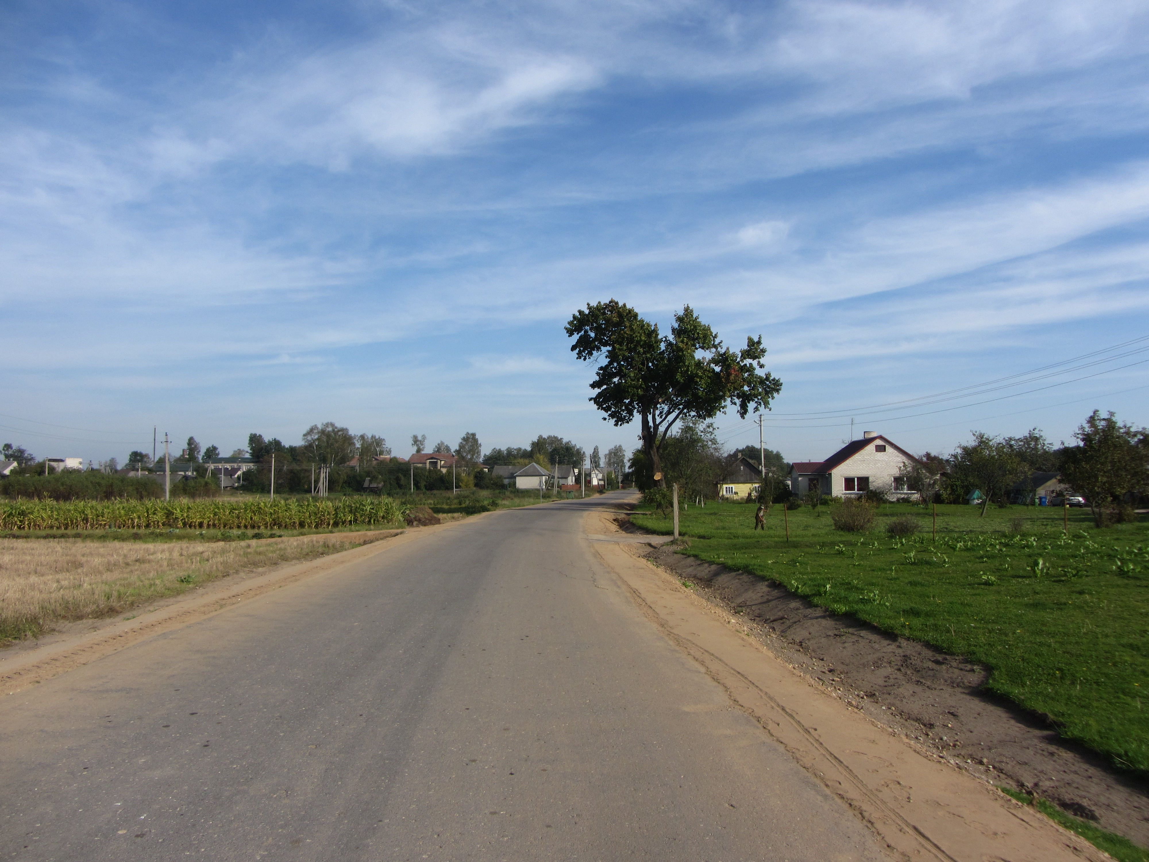 Sarapiniškės, Lithuania